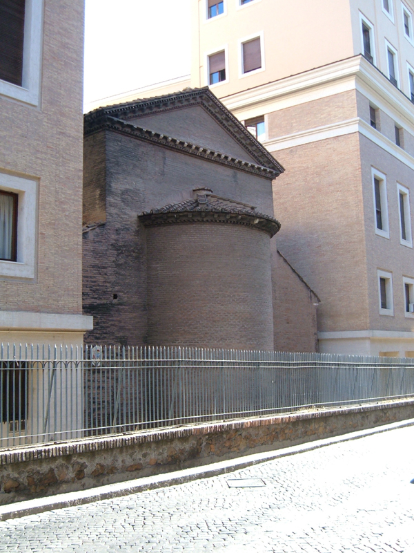 Chiesa sconsacrata di San Lorenzo in Piscibus, a Roma, nel rione Borgo. Foto personale.